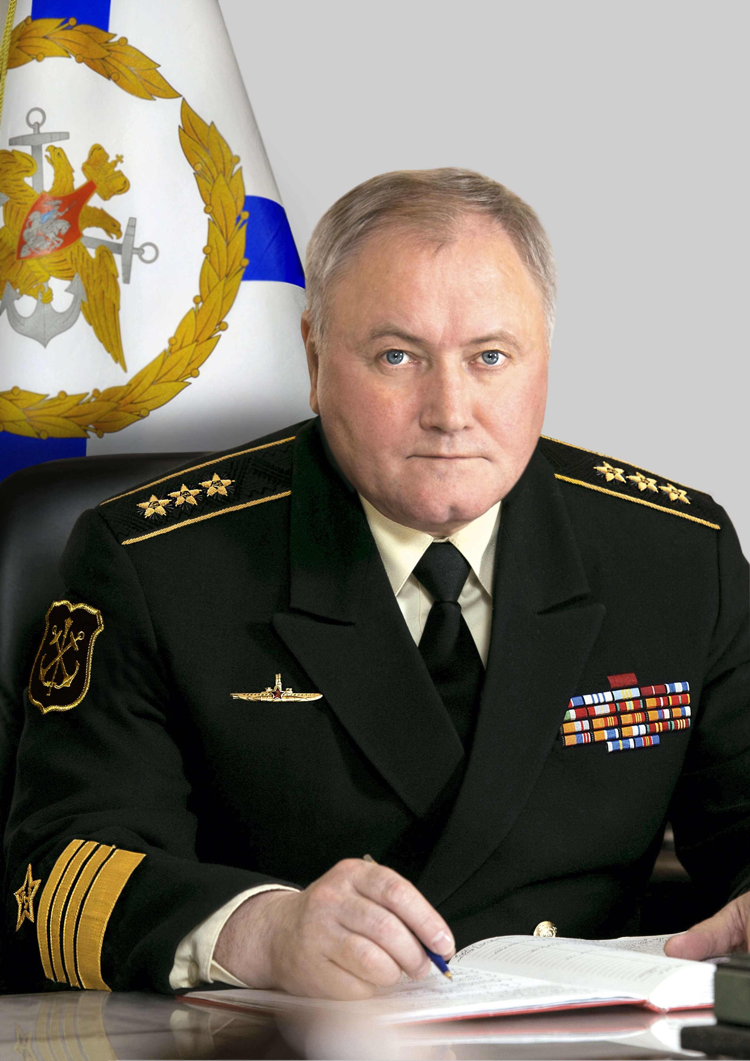 Главнокомандующий Военно-морским флотом Российской Федерации адмирал Королёв Владимир Иванович